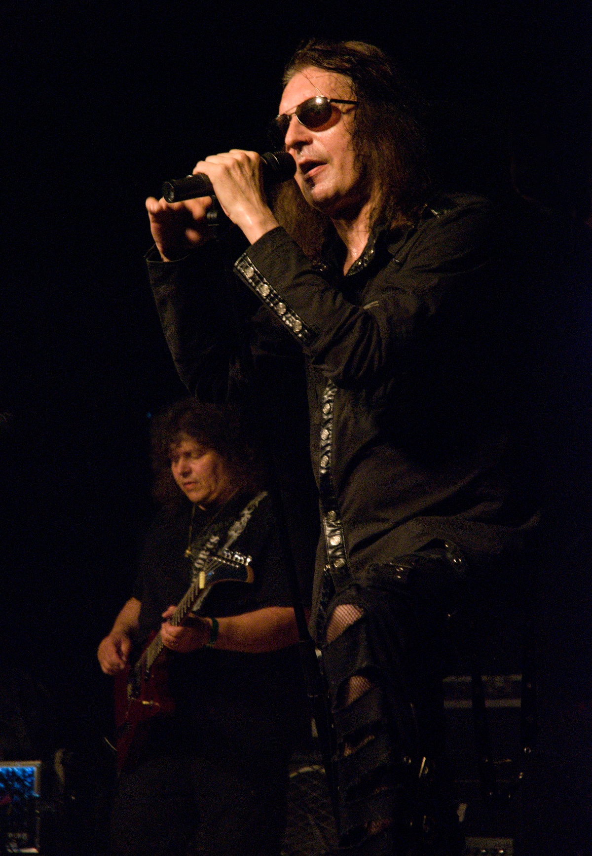 Aleš Brichta vzpomínkovém koncertu v Domě Barikádníků (v pozadí kytarista Miloň Šterner)